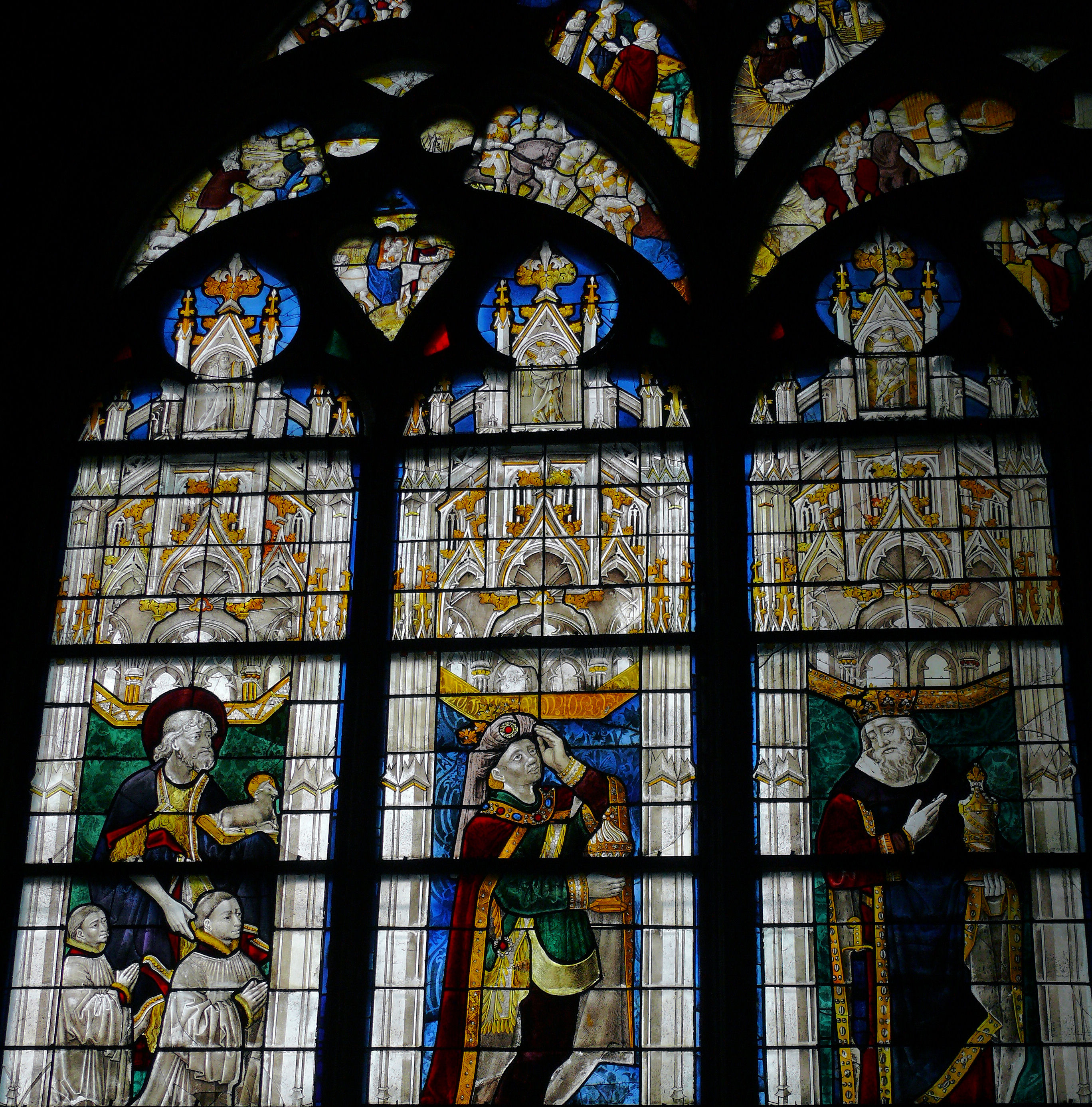 Bourges - Cathédrale - Chapelle Du Breuil - Vitrail de l'Adoration des Rois Mages